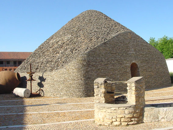 Arquitectura rural llamado bombo en el recinto del Museo de Carro en Campo de Tomelloso (Ciudad Real, España). Fotografía tomada en junio de 2004, con cámara digital. Autor, Lourdes Cardenal.